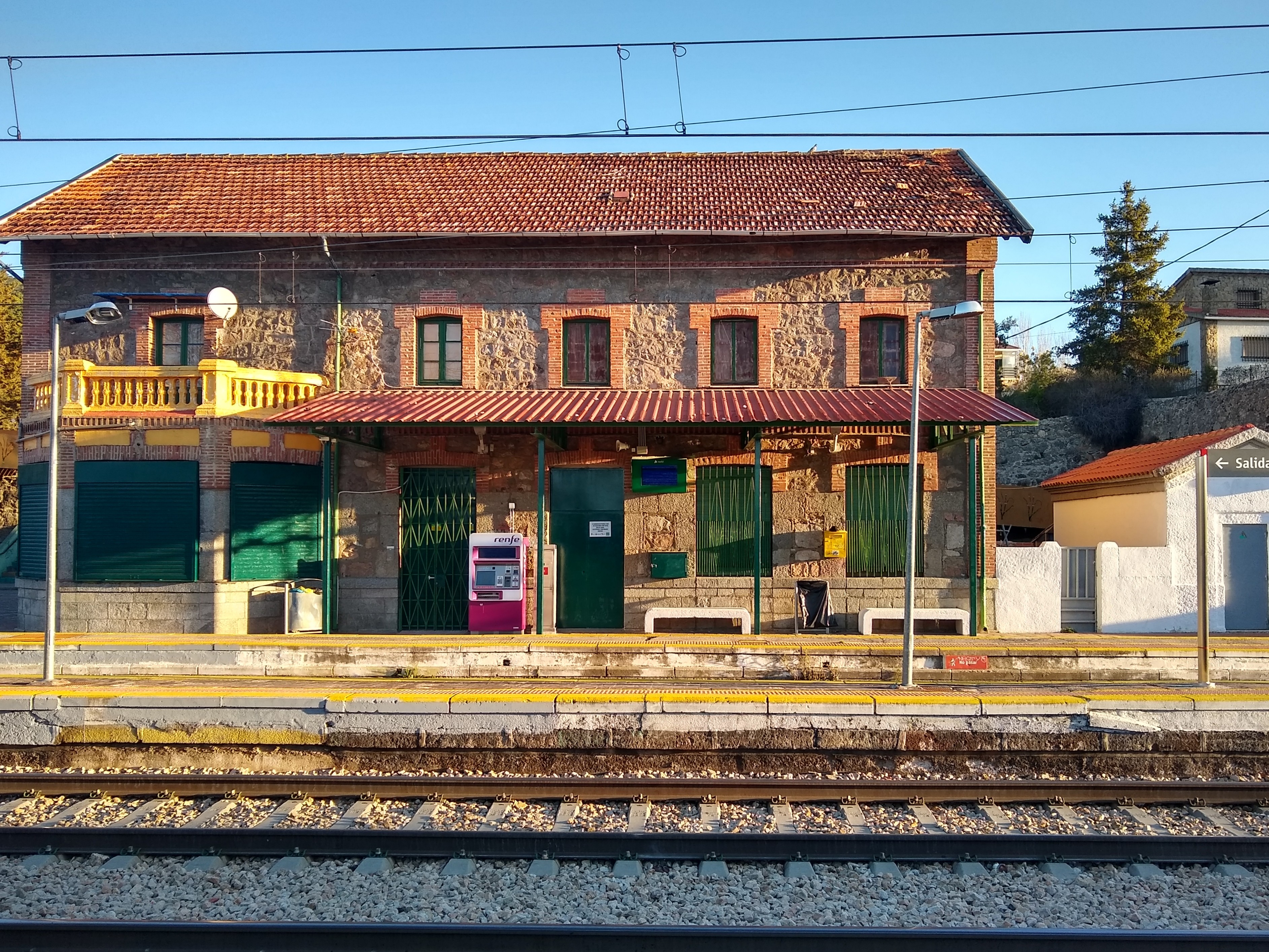 Estación de Santa María de la Alameda, Madrid